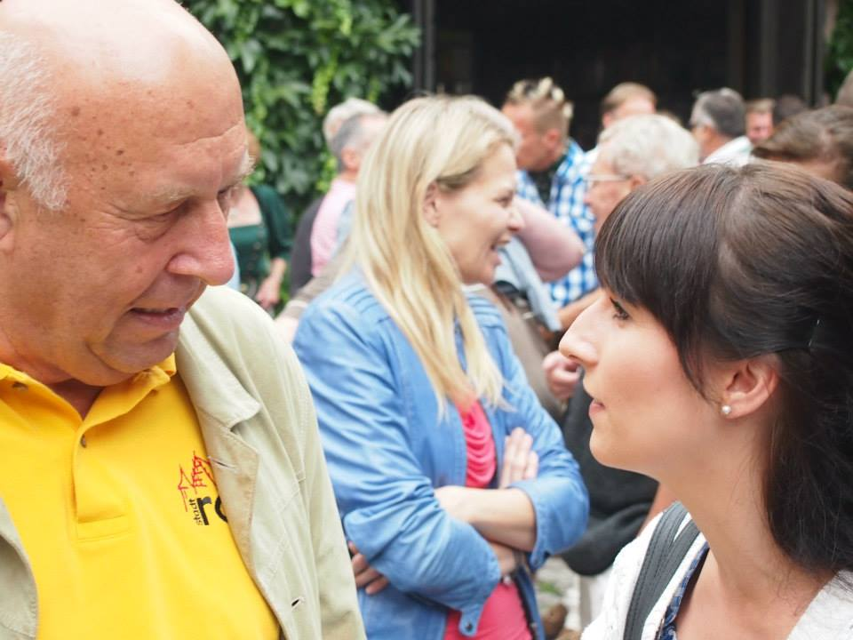 Staatsminister a.D. Dr. Manfred Weiß im Gespräch mit der Landkreisjugend 2013.